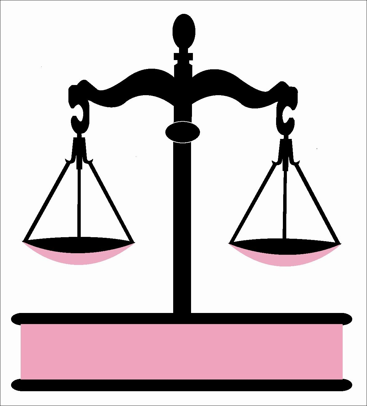 Logo Istiqlal